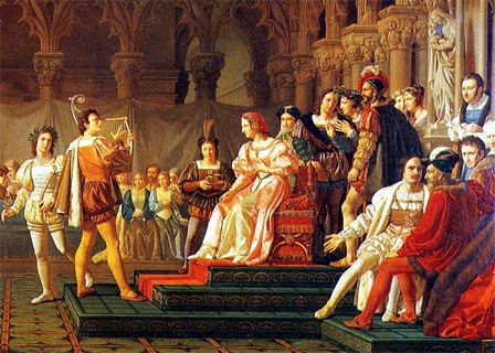 Clémence Isaure distribuant des fleurs aux troubadourds par Félix SAURINES // Le musée du Vieux-Toulouse